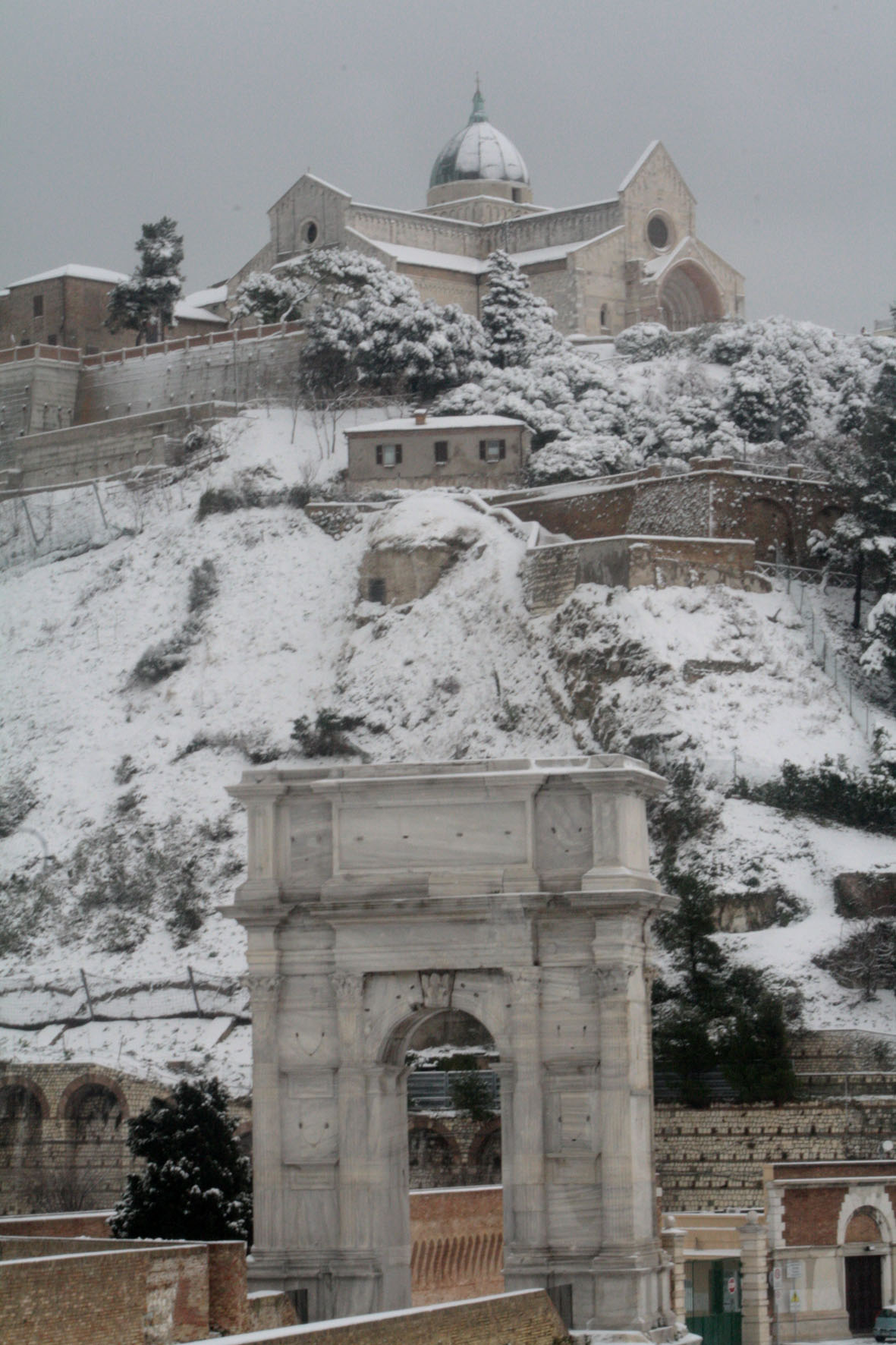 Arco di Traiano This is a photo of a monument which is part of cultural heritage of Italy.